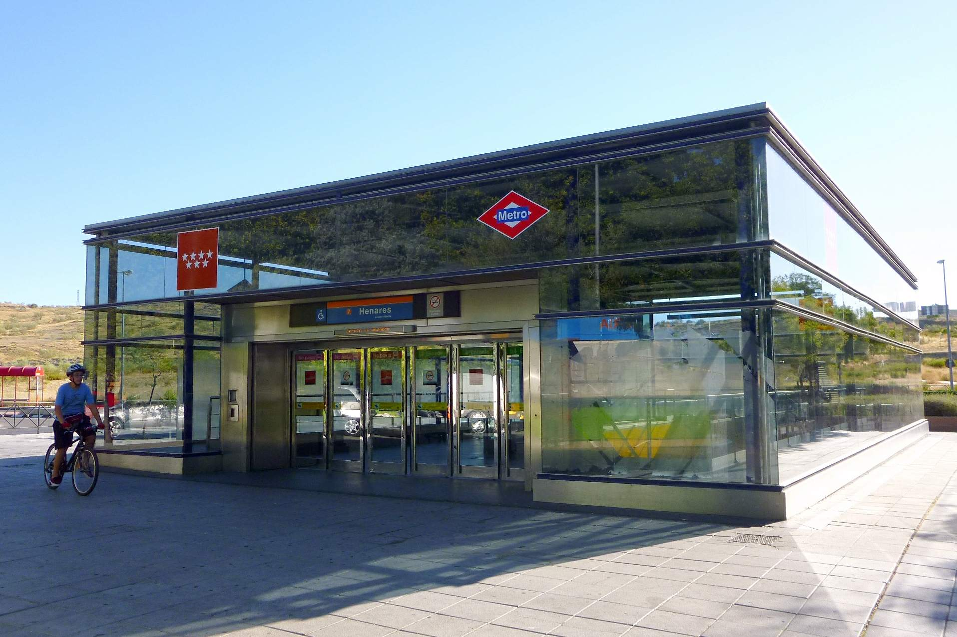 San Fernando de Henares - Estación de Henares, de Metro de Madrid